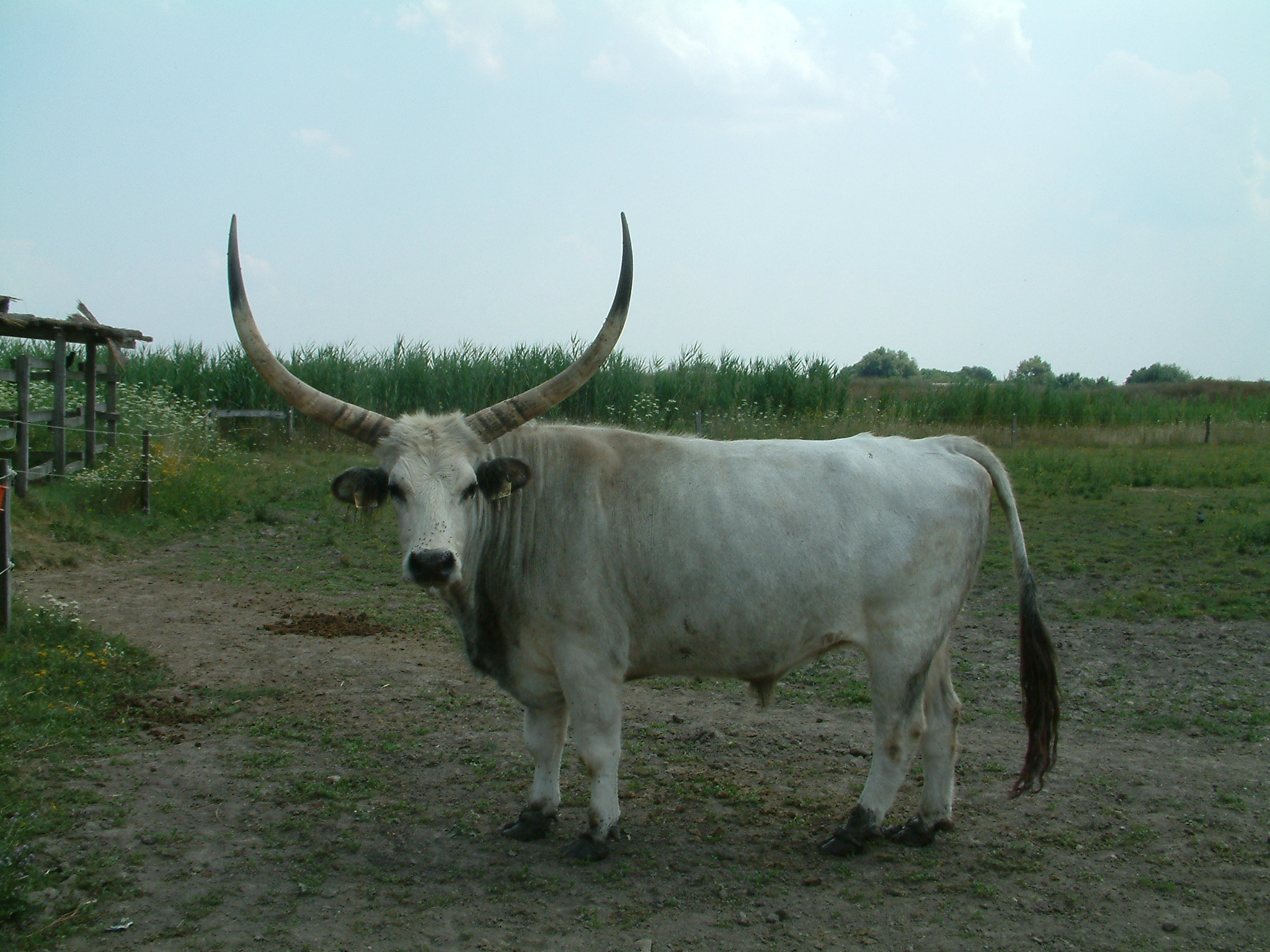 Szürkemarha bika